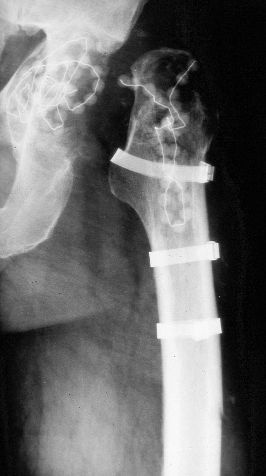 Girdlestone-Situation nach Ausbau einer infizierten Totalendoprothese des linken Hüftgelenks. Zur Zemententfernung wurde das obere Femurende gefenstert. Der Kortikalisspan ist mit drei Cerclagen refixiert. Im Pfannenlager und in der Markhöhle des Femurs sind PMMA-Ketten eingelegt.